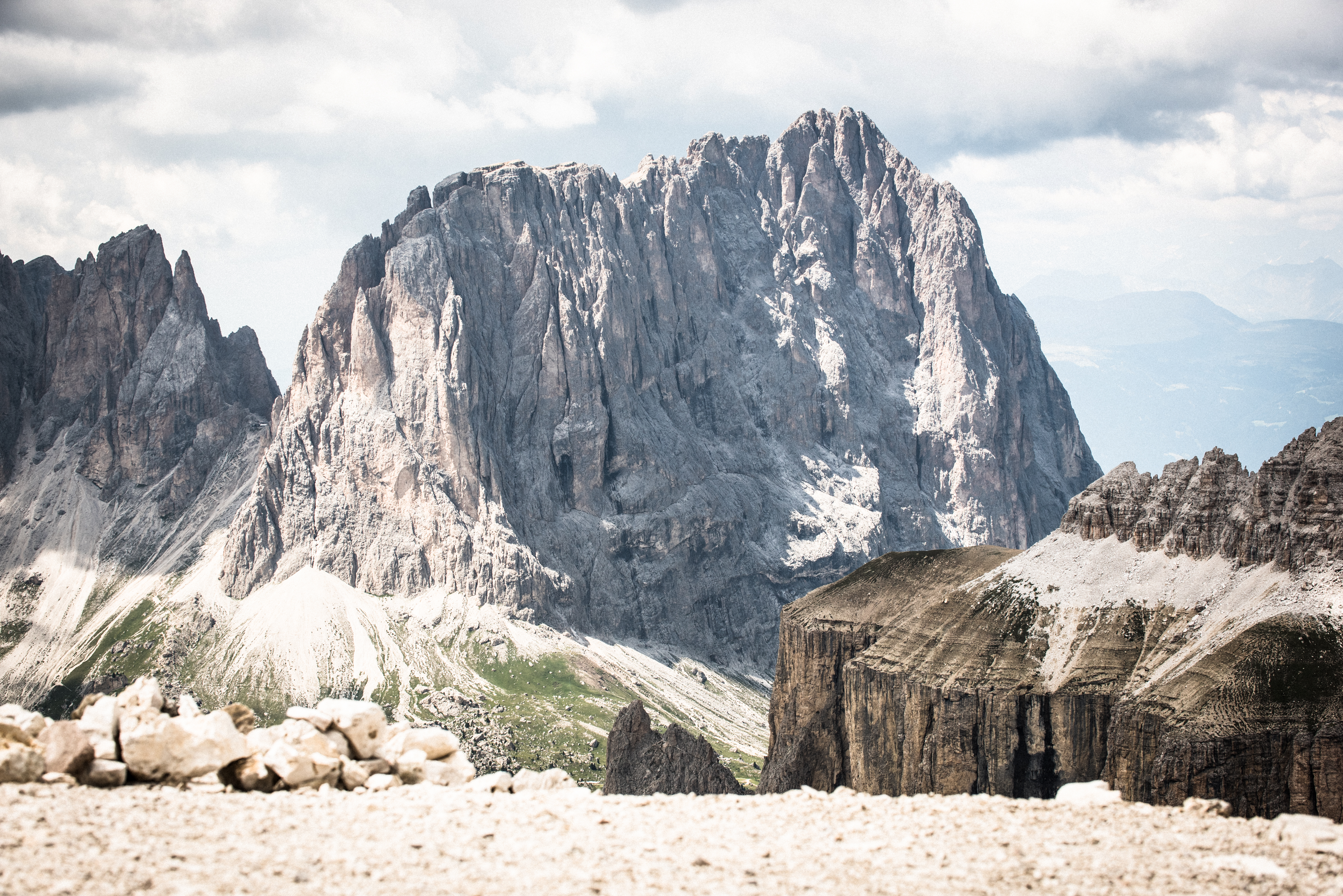 Vista del Sassolungo ripreso dalla cima del Sass Pordoi